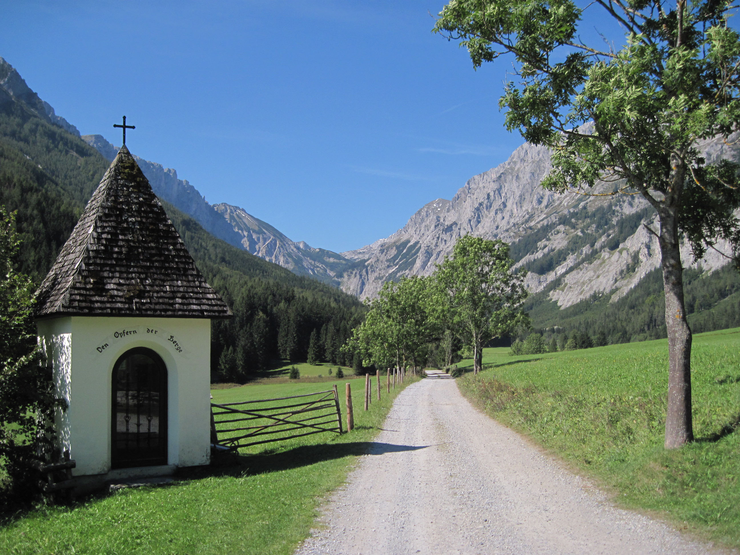 Eingang zur unteren Dullwitz bei Seewiesen, typischer Ausgangsort für Besteigungen des Hochschwabs, im Hintergrund die Aflenzer Staritzen